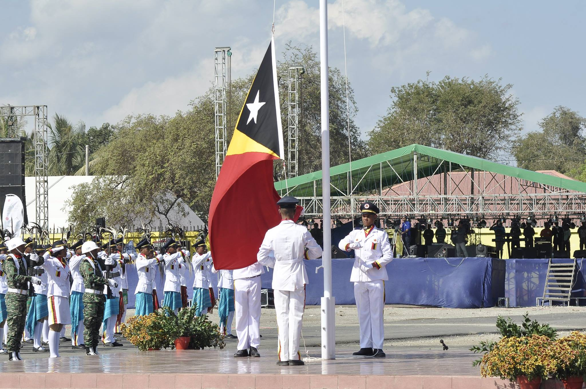 Tetun: Serimónia Komemorasaun Loron Proklamasaun Indpendénte